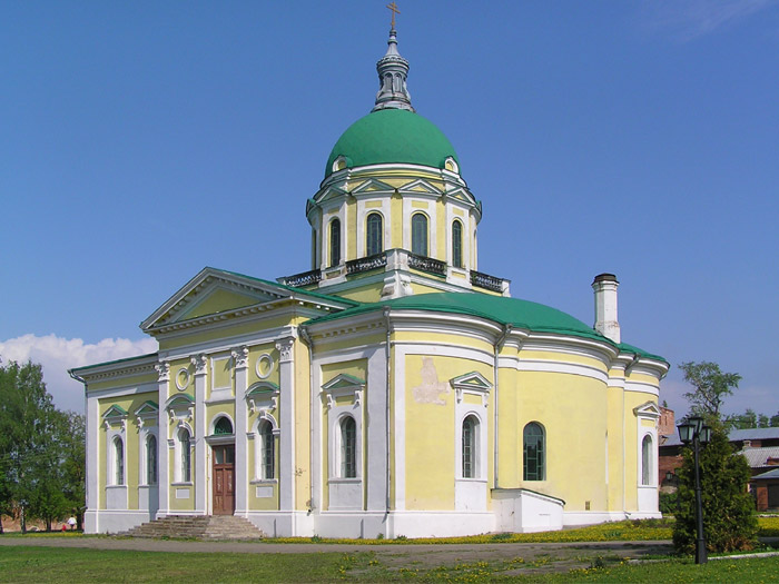 Предтеченский Собор в городе Зарайске Зарайского уезда Рязанской губернии (ныне - Зарайский район Московской области). Фото из частного архива Кутаева Владимира Степановича